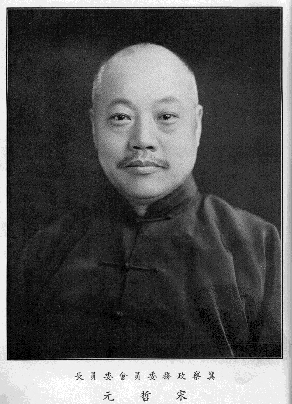 中文（台灣）: 宋哲元01